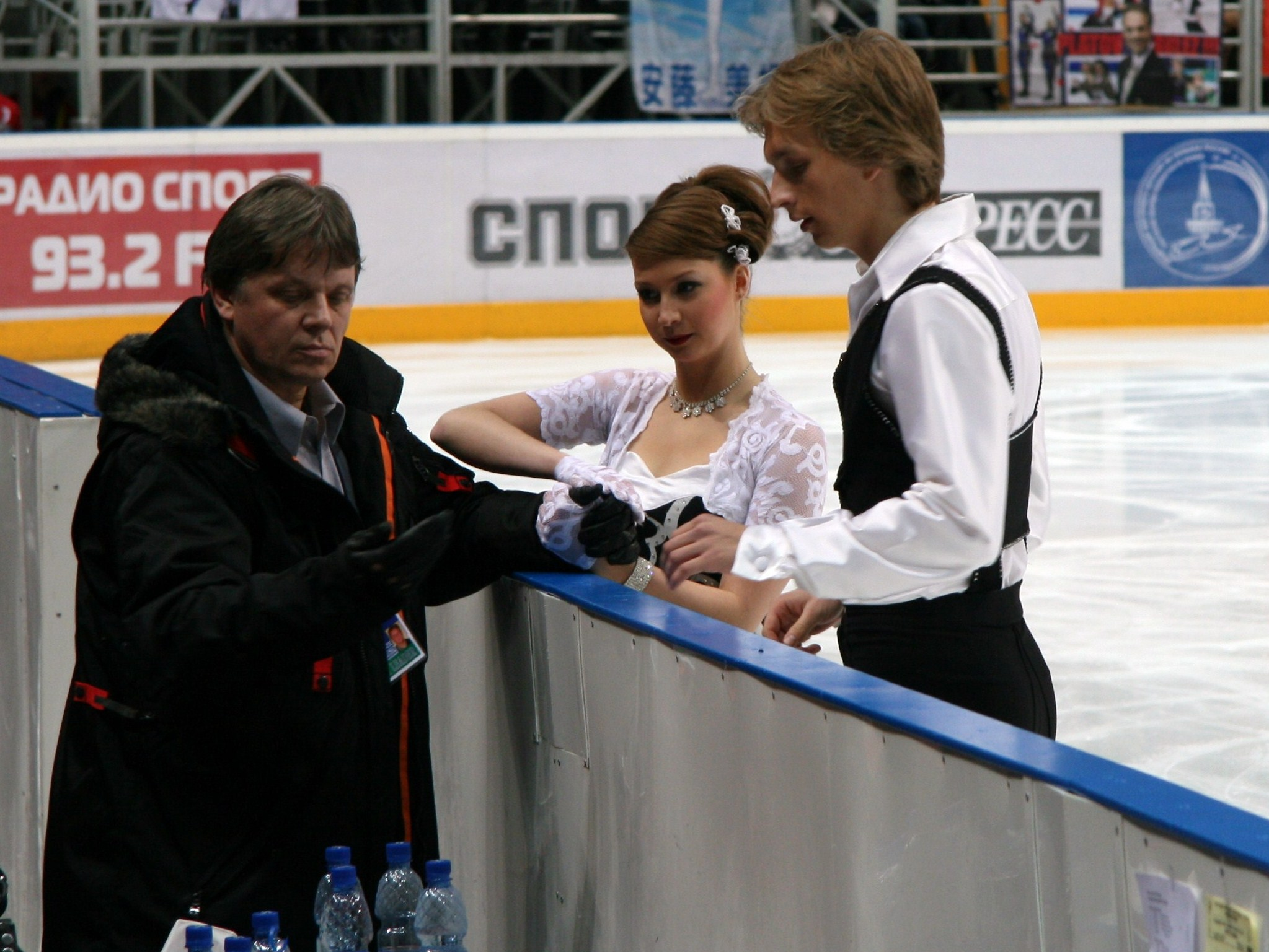 Rostislav Sinitsyn, Lucie Myslivečková and Matěj Novák at the 2010 Cup of Russia